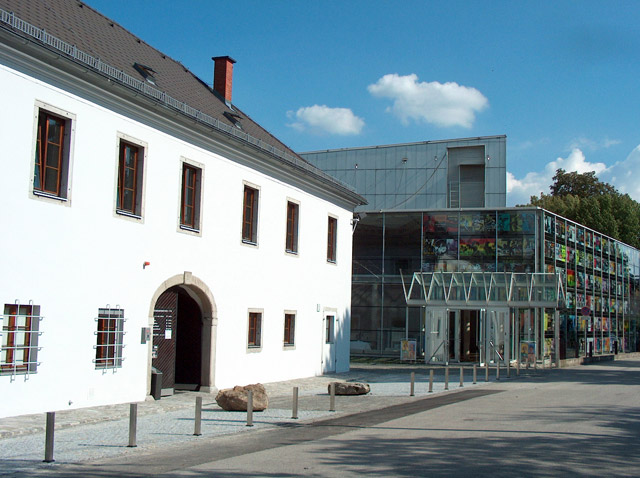 Posthof-Außenansicht neu (2004)